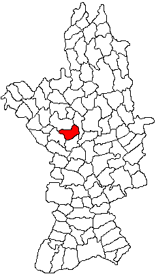 Categorie:Hărţi ale judeţului Olt